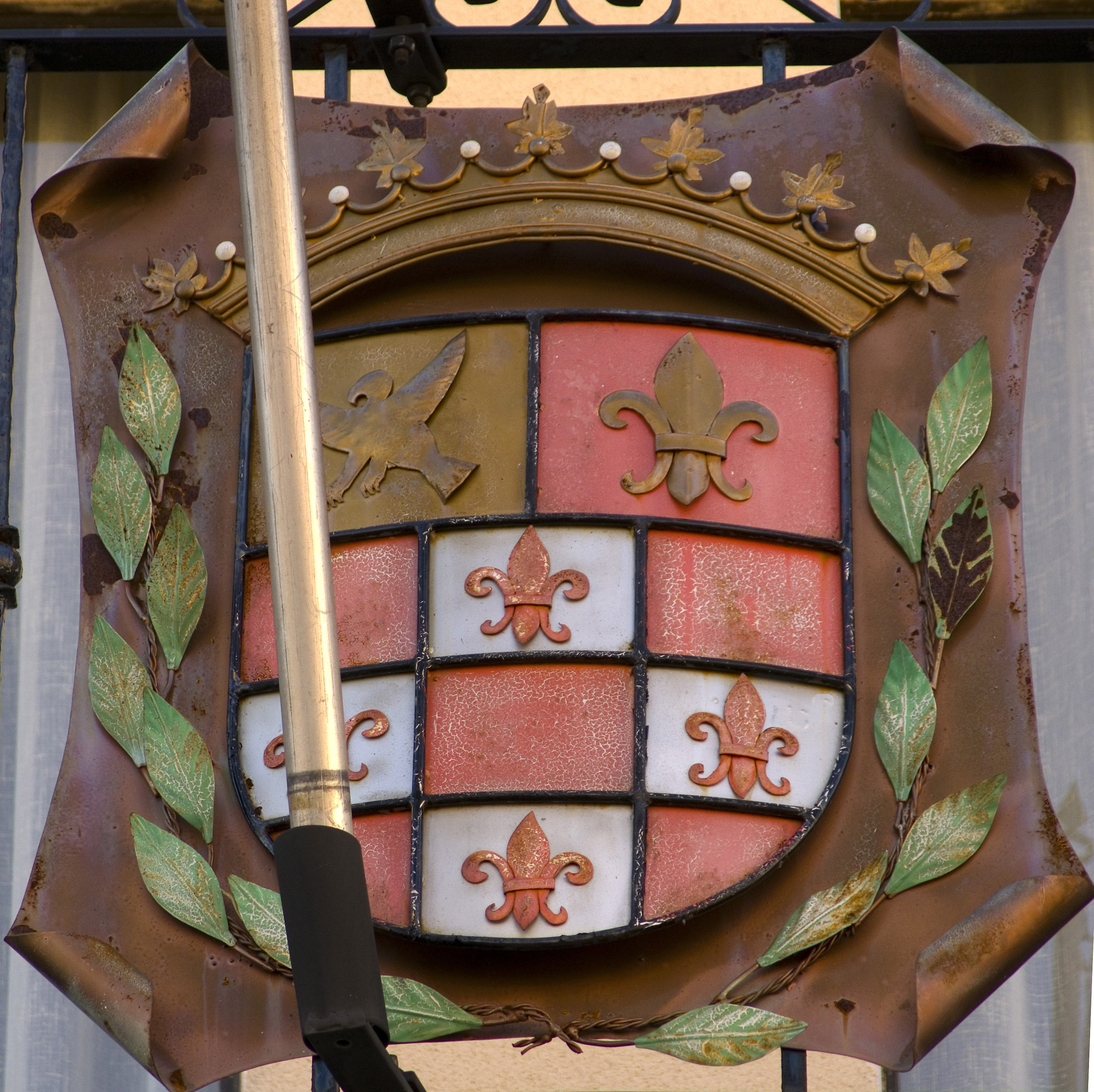 Poble de la Ribera Alta (País Valencià)